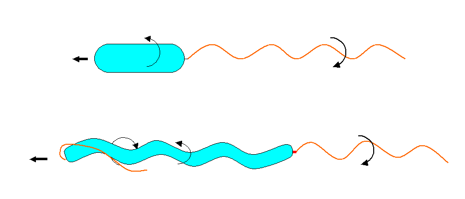 Flagellen-Bewegung bei polar begeißelte Bakterien